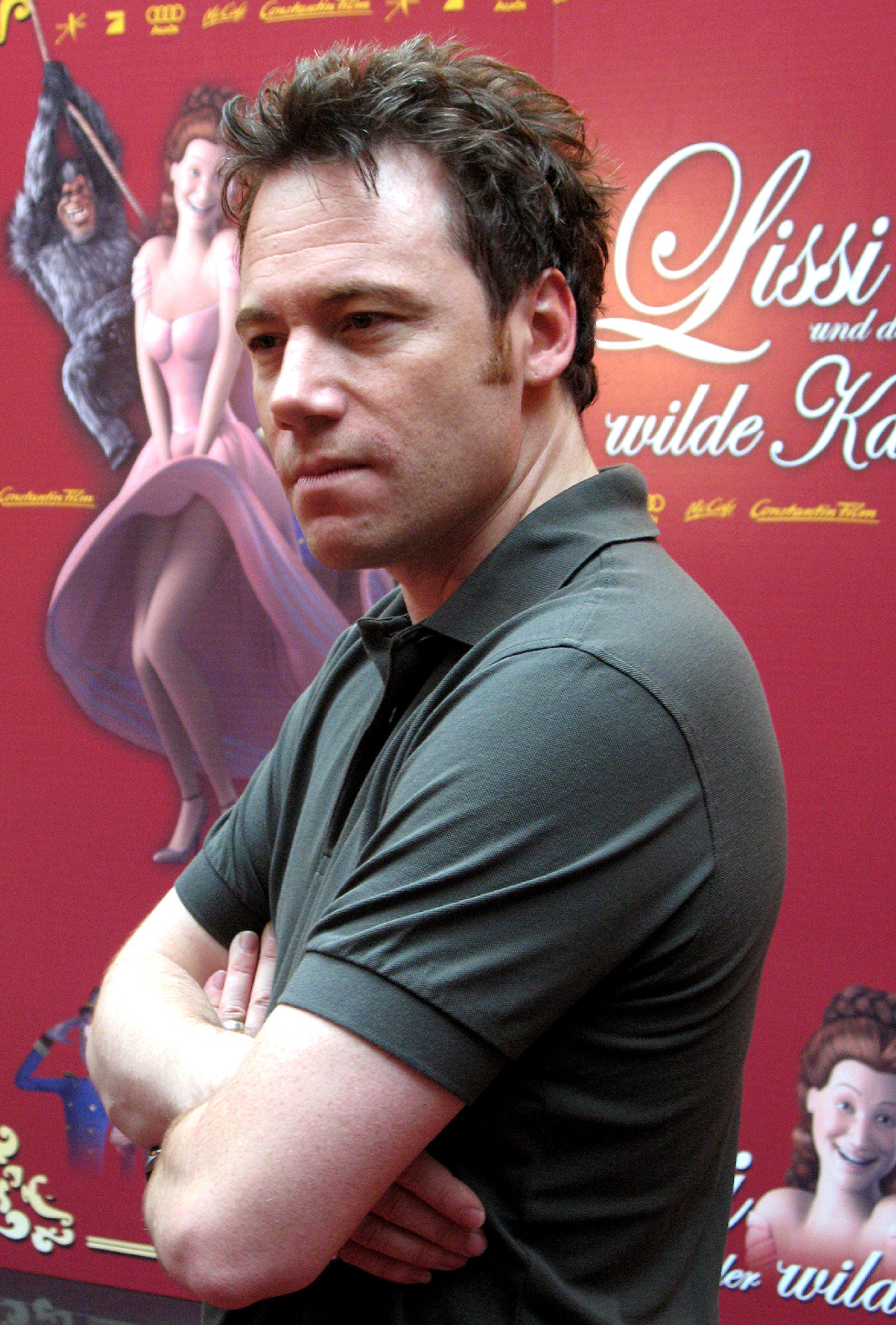 Michael Herbig bei der Pressevorstellung von Lissi und der wilde Kaiser, Berlin, 2.10.2007